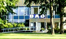 Broängsbadet var ett badhus i Kristinehamn som revs 2012